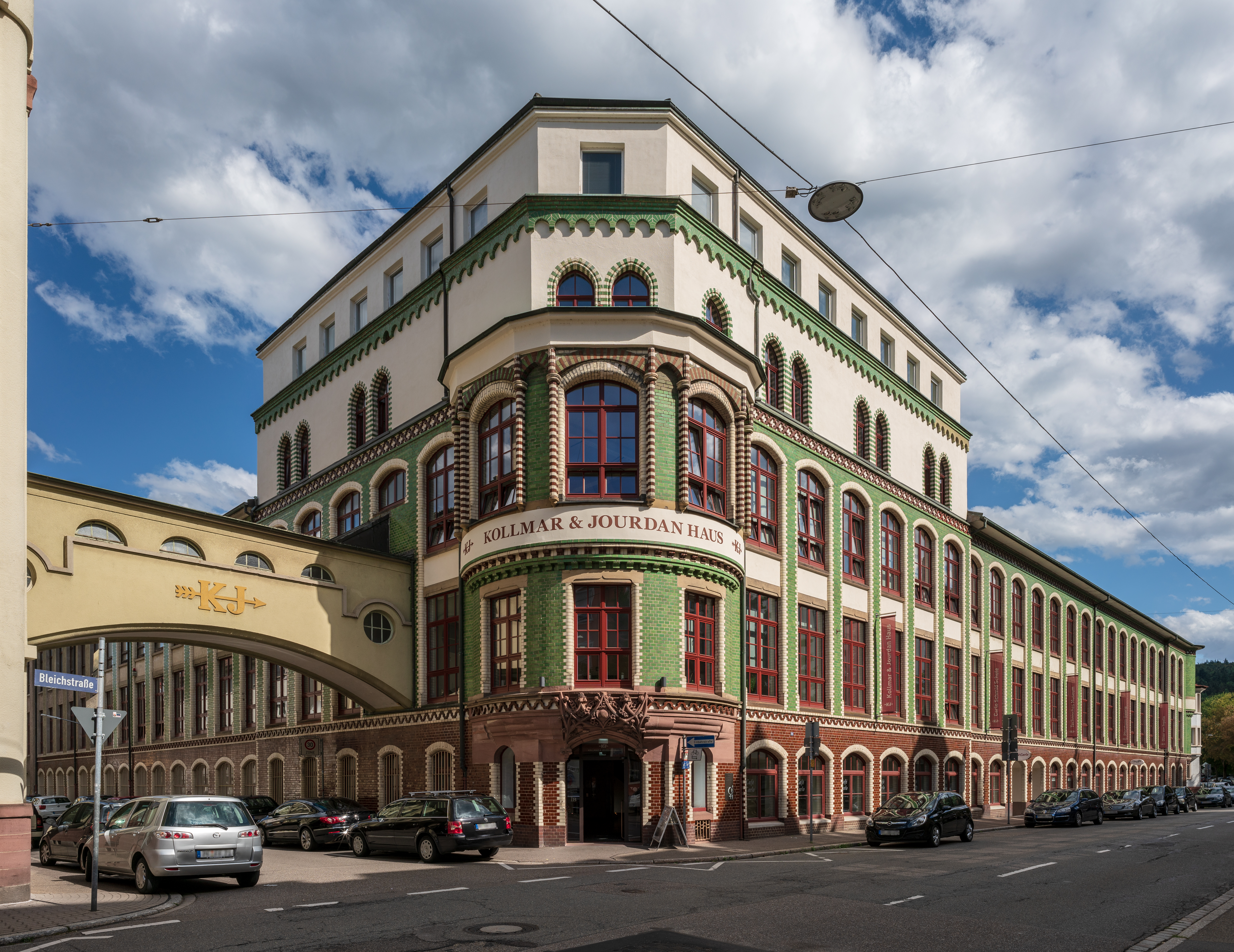 Pforzheim: Das denkmalgeschützte Kollmar & Jourdan-Haus, ein wichtiges Zeugnis der Industriearchitektur und eines der wenigen erhaltenen Zeugnisse der einst berühmten Pforzheimer Schmuck- und Uhrenindustrie, erbaut 1901–1910 nach Plänen des Architekturbüros Hermann Walder. Ansicht der Nordwest-Ecke mit dem Haupteingang des Gebäudes, rechts die lange Westfassade entlang der Bleichstraße. Die warmen Farben und harten Kontraste kommen von der Sonne, die gerade für einen Augenblick durch die Wolken bricht (sog. „Gewitterlicht“).